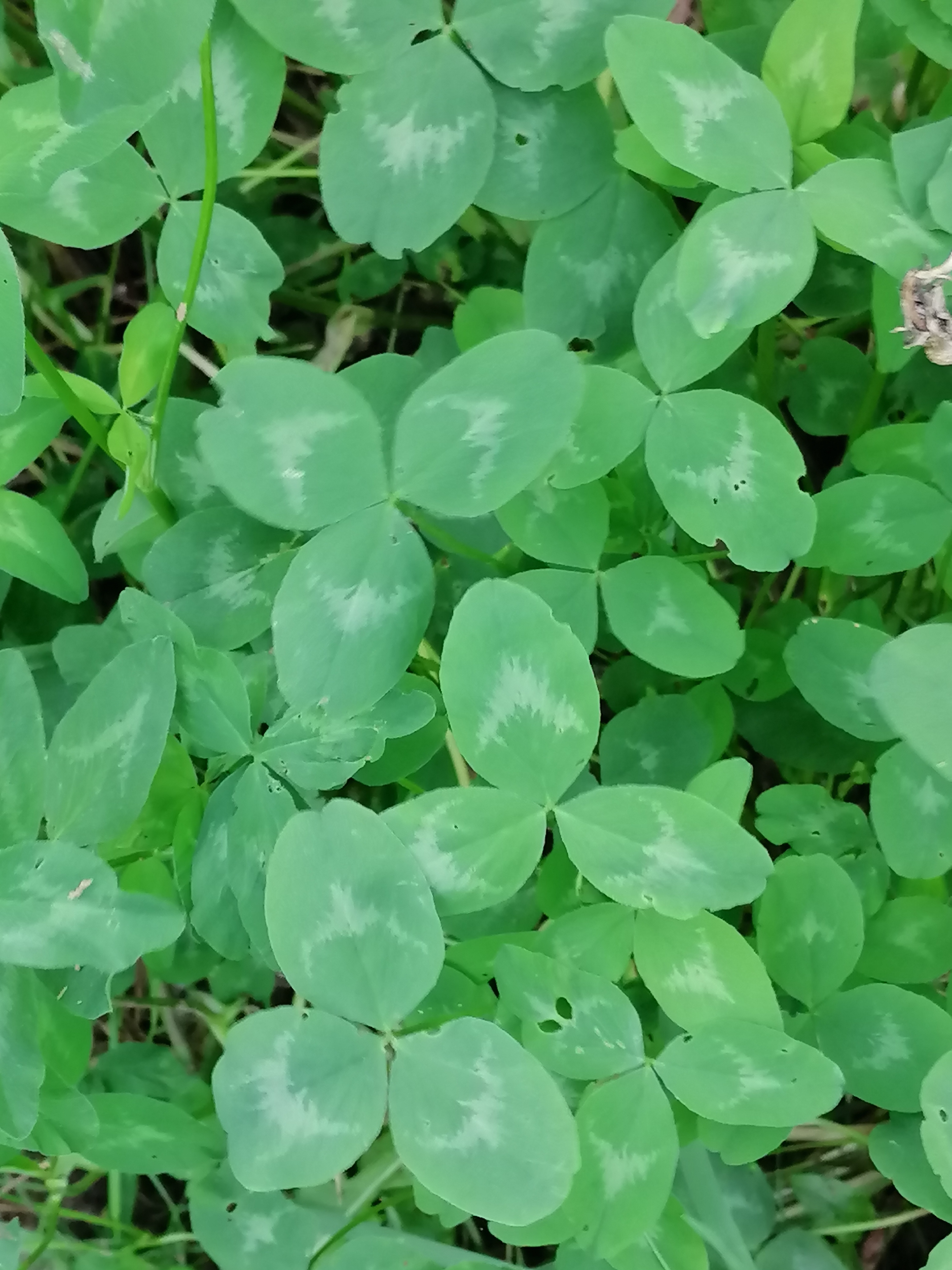 Копосовская дубрава: п. Копосово, в 500 м от автобусной остановки "ул. КИМа" - в пойме р. Волги, на северо-западной окраине Нижнего Новгорода, Сормовский район, Нижний Новгород, Нижегородская область This image is related to the protected area of Russia number 5210391